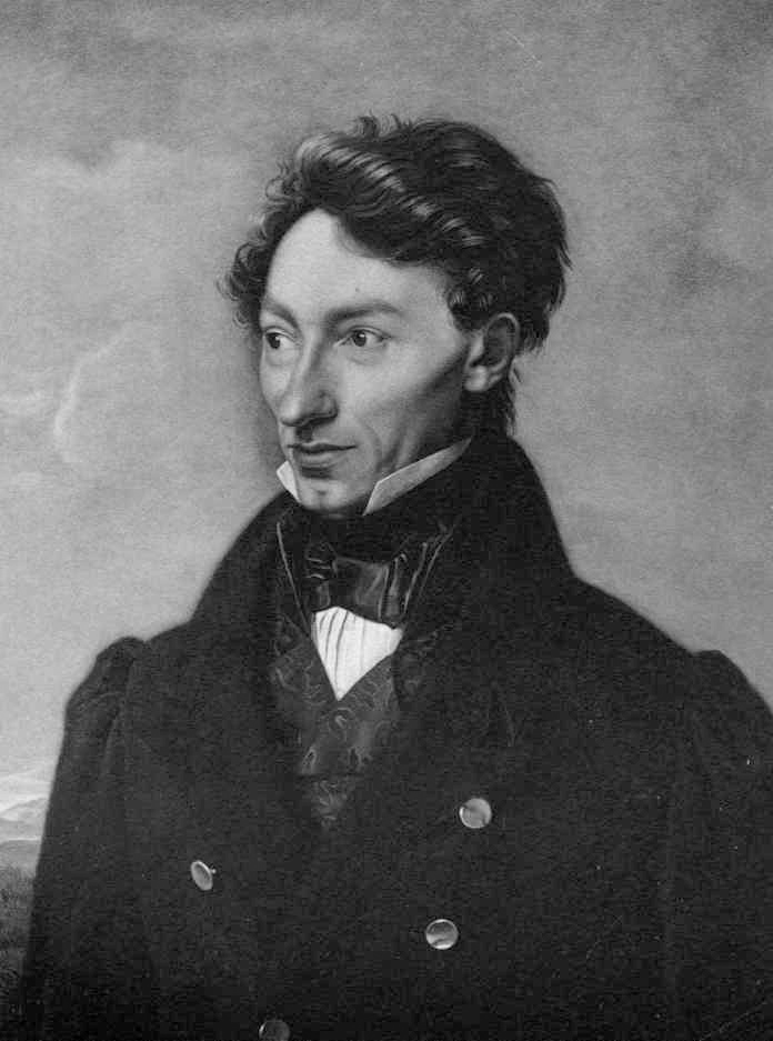 Karl August Siegmund Schultze